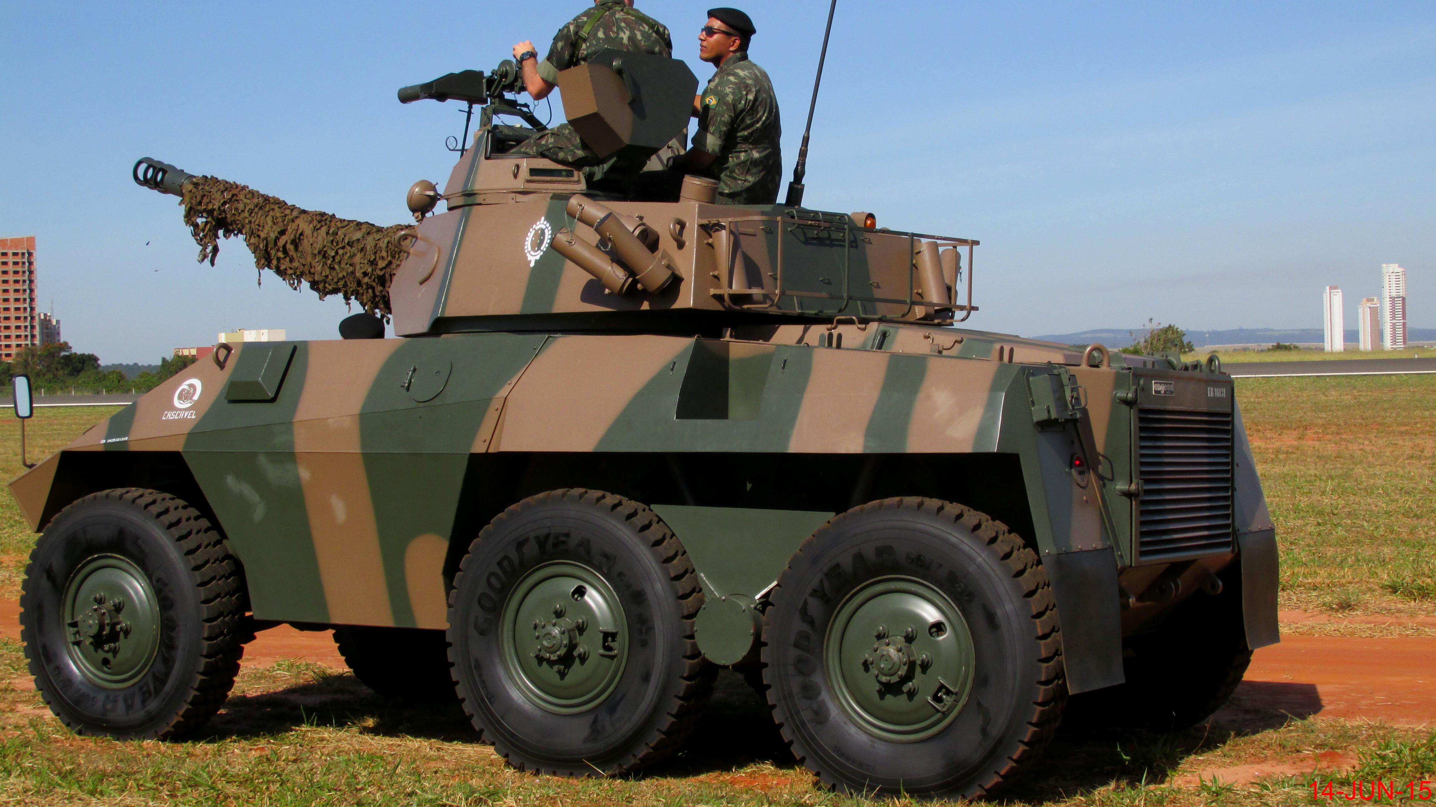 Blindado Cascavel (EE-9) do 13º Regimento de Cavalaria Mecanizada ou Esquadrão Anhanguera que vieram exclusivamente de Pirassununga/SP para o evento Arraiá Aéreo. Os blindados fabricados pela Engesa fizeram grande sucesso no evento